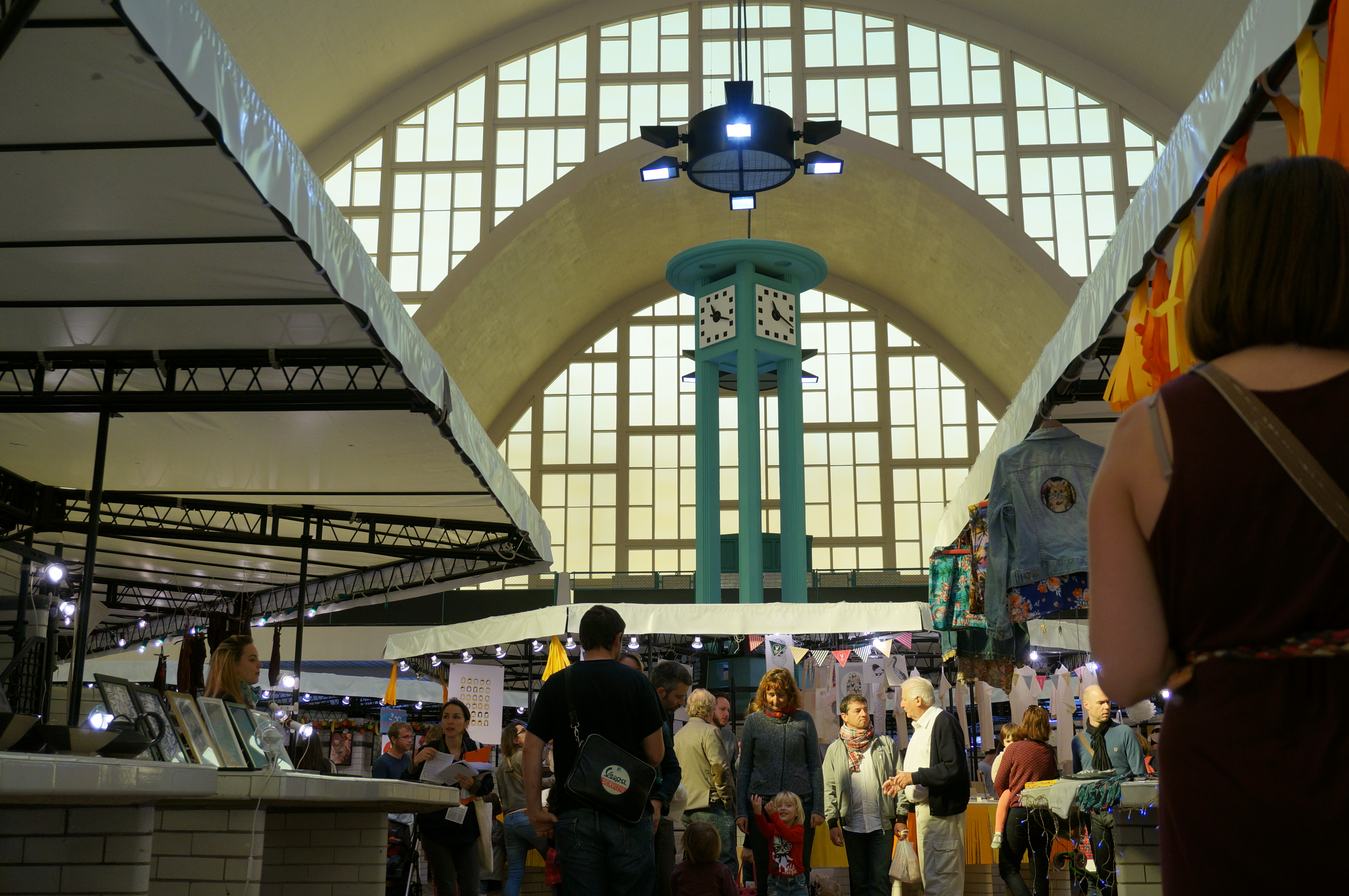 Lors du festival Elektricity.